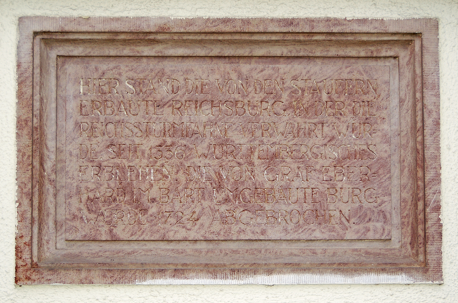 HIER STAND DIE VON DEN STAUFERNERBAUTE REICHSBURG, IN DER DIEREICHSSTURMFAHNE VERWAHRT WUR=DE. SEIT 1336 WÜRTTEMBERGISCHESERBLEHEN. DIE VON GRAF EBER=HARD IM BART UMGEBAUTE BURGWURDE 1724 ABGEBROCHEN. [Hier stand die von den Staufern erbaute Reichsburg, in der die Reichssturmfahne verwahrt wurde. Seit 1336 württembergisches Erblehen. Die von Graf Eberhard im Bart umgebaute Burg wurde 1724 abgebrochen.]